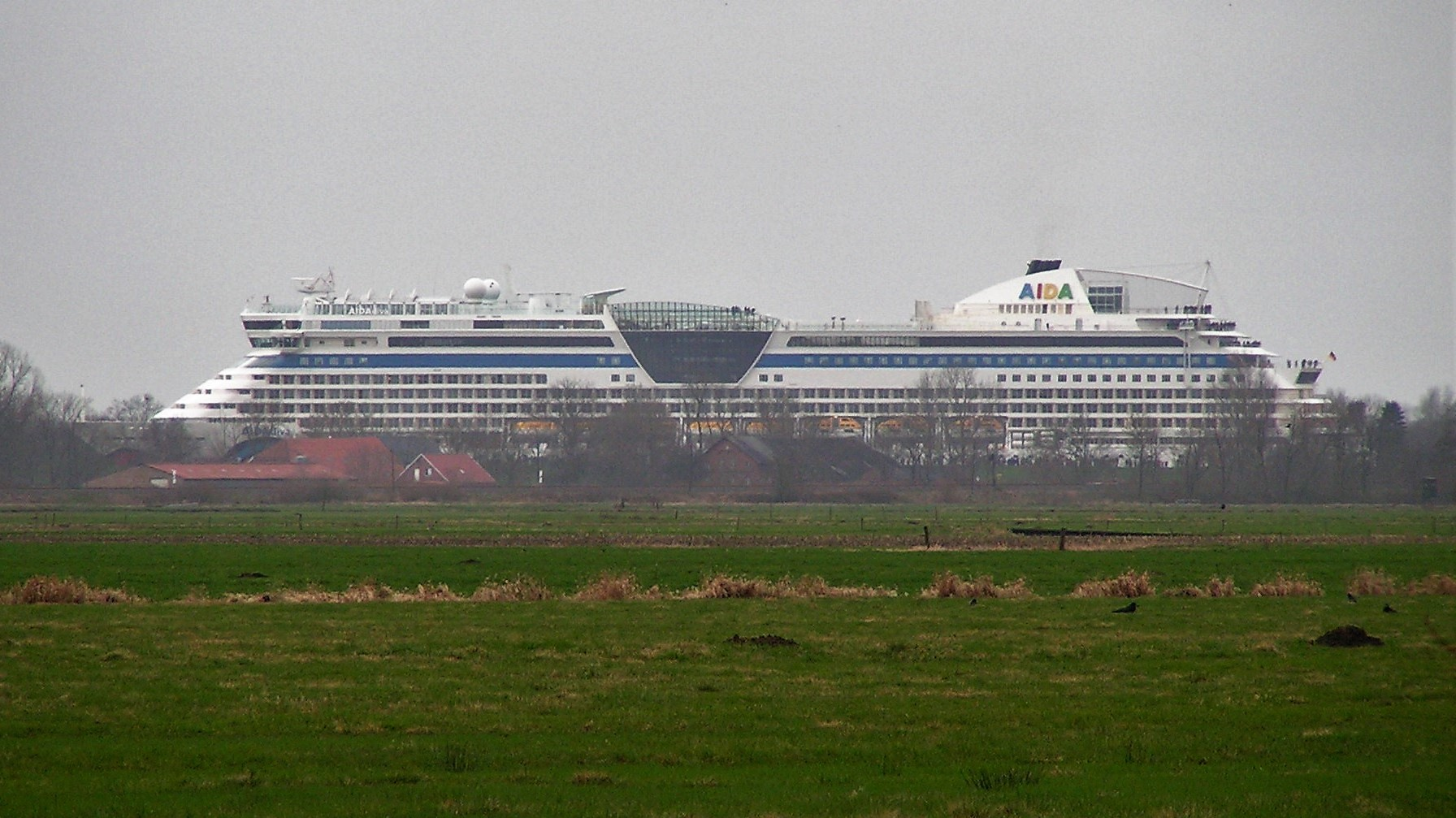 Am 10. März 2007 wurde die AIDAdiva auf der Ems von Papenburg nach Eemshaven überführt. Das Foto wurde mit Teleobjektiv von Lütjegaste (Gemeinde Westoverledingen im Landkreis Leer/Ostfriesland) über die Emsmarsch hinweg aufgenommen. Die Häuser vor dem Schiff stehen direkt vor dem Emsdeich und gehören zu Dorenborg.